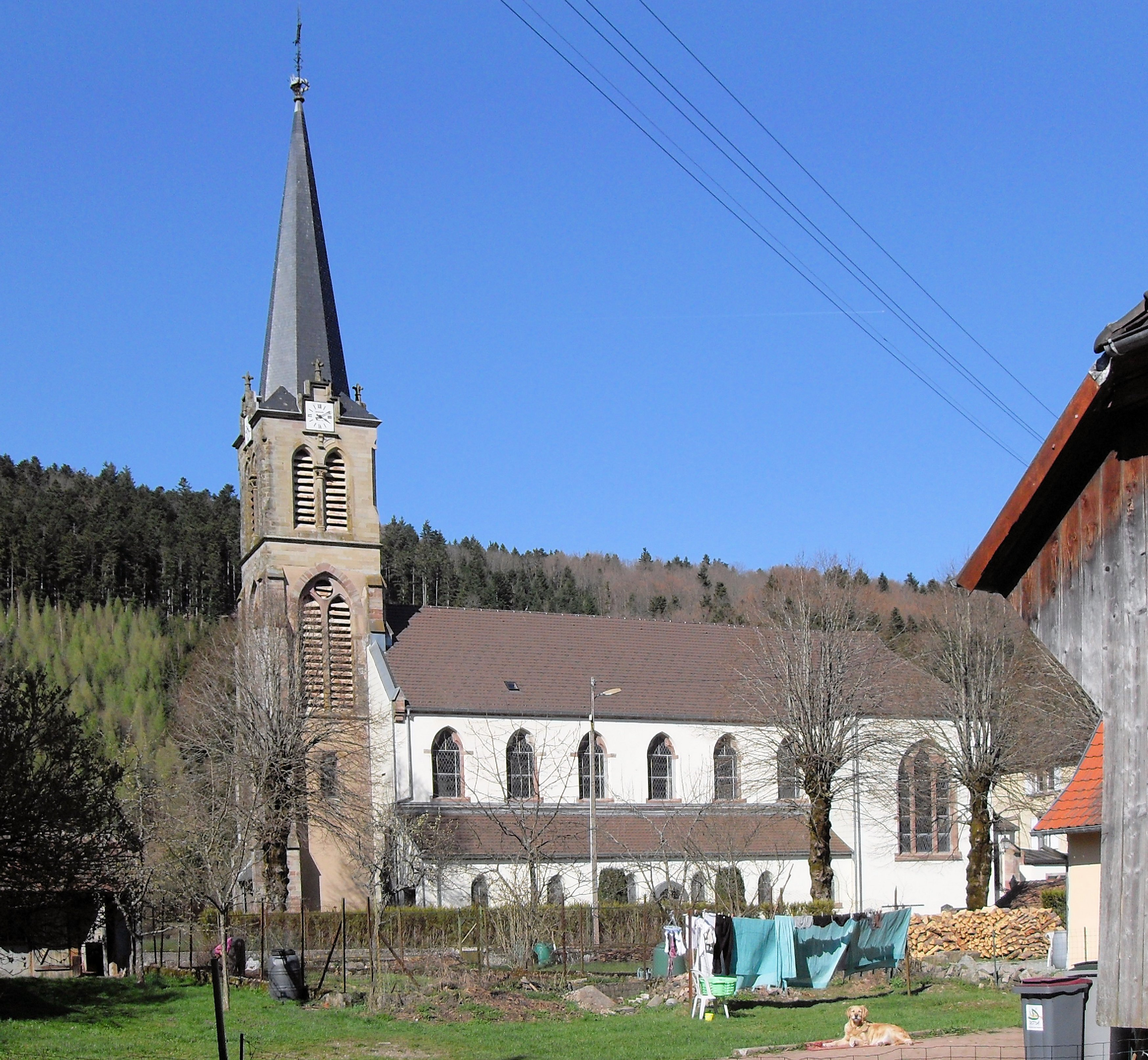 L'église de l'Exaltation-de-la-Sainte-Croix à Dolleren